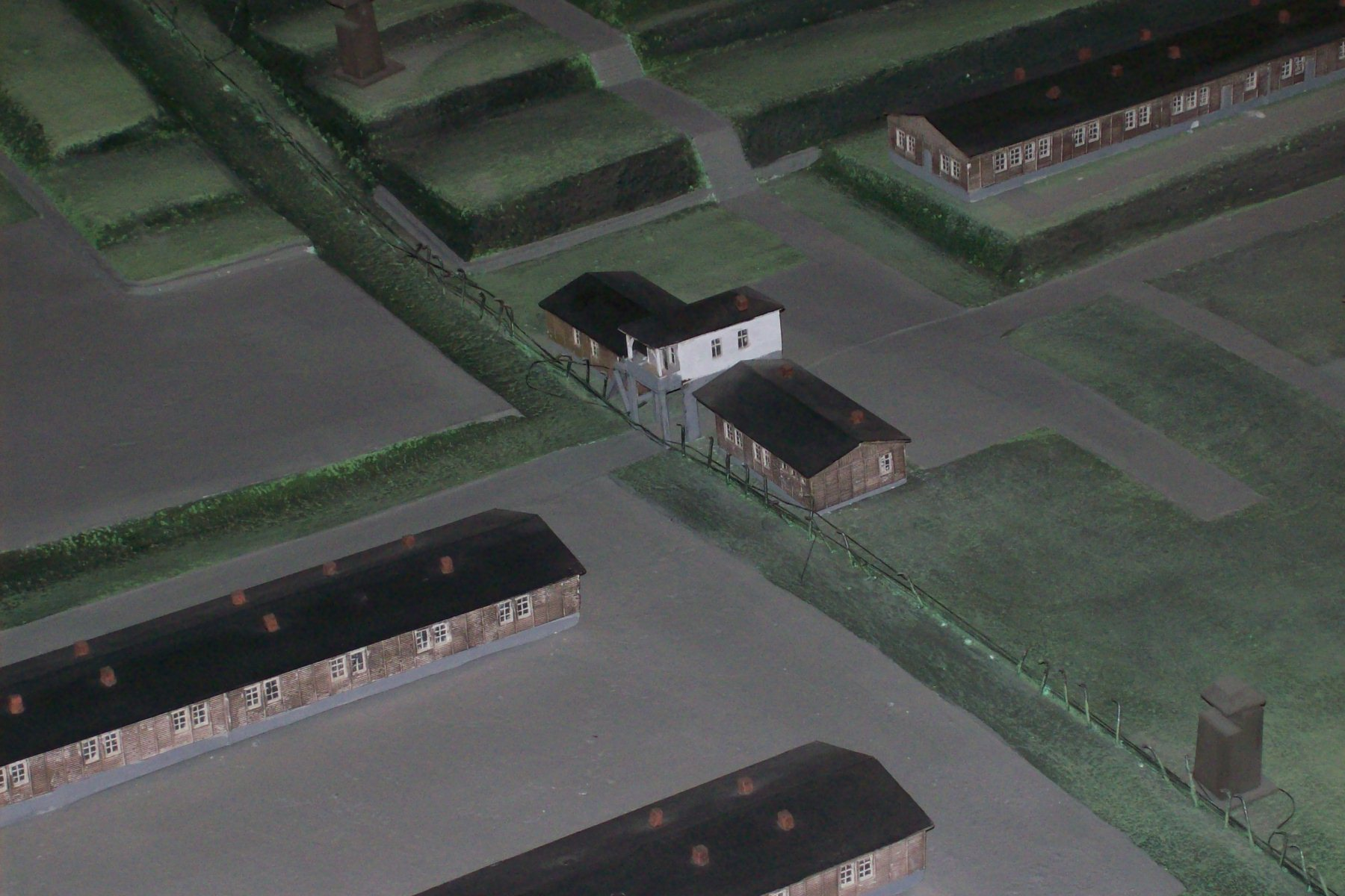 Makieta obozu Gross Rosen w Rogoźnicy